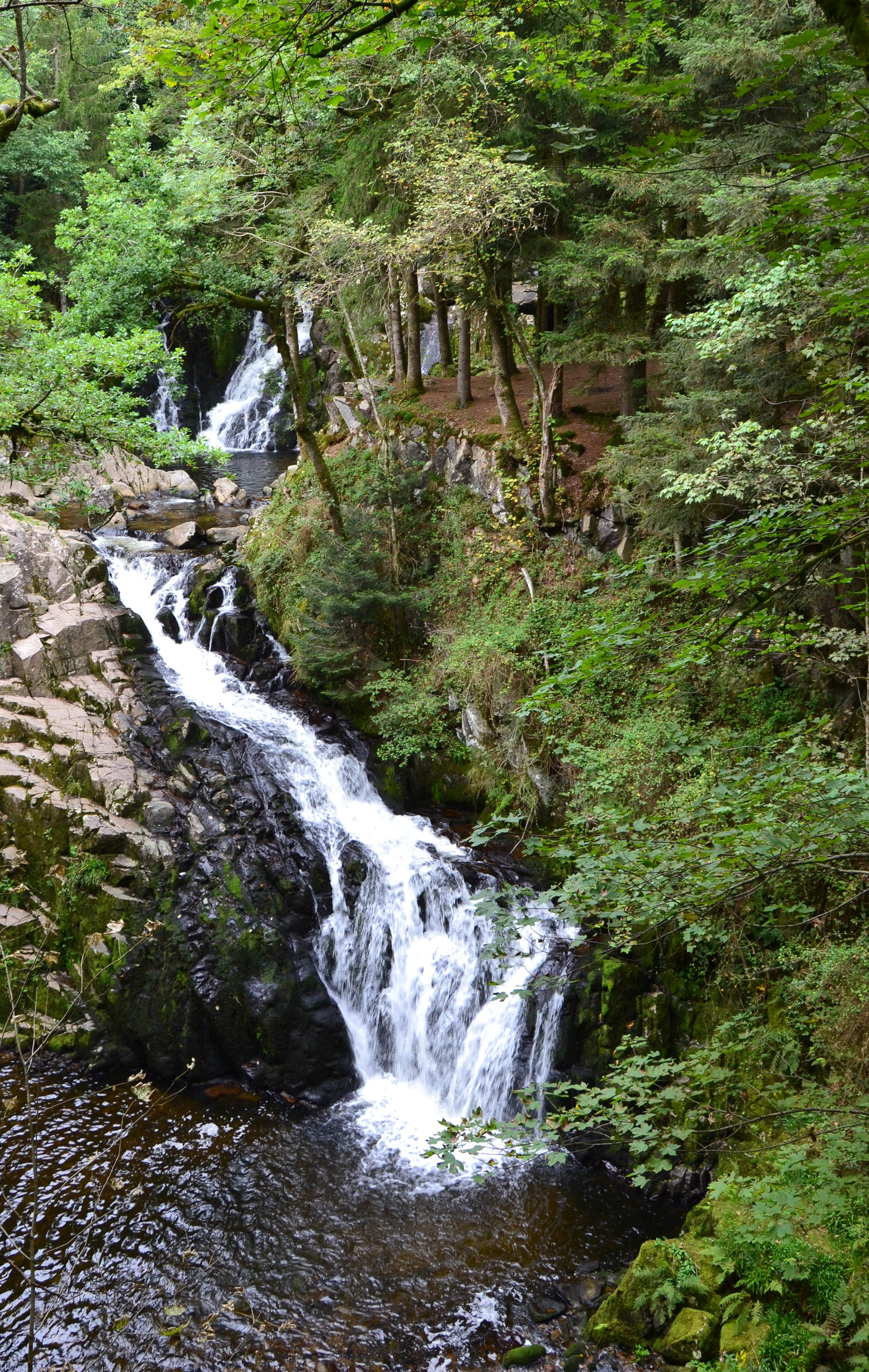 Le Saut du Bouchot situé entre Sapois et Gerbamont.